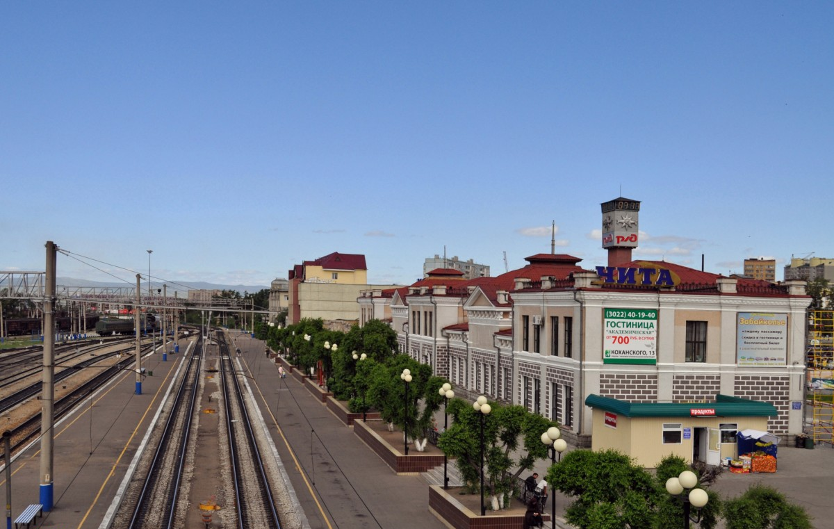 Железнодорожная станция Чита-2